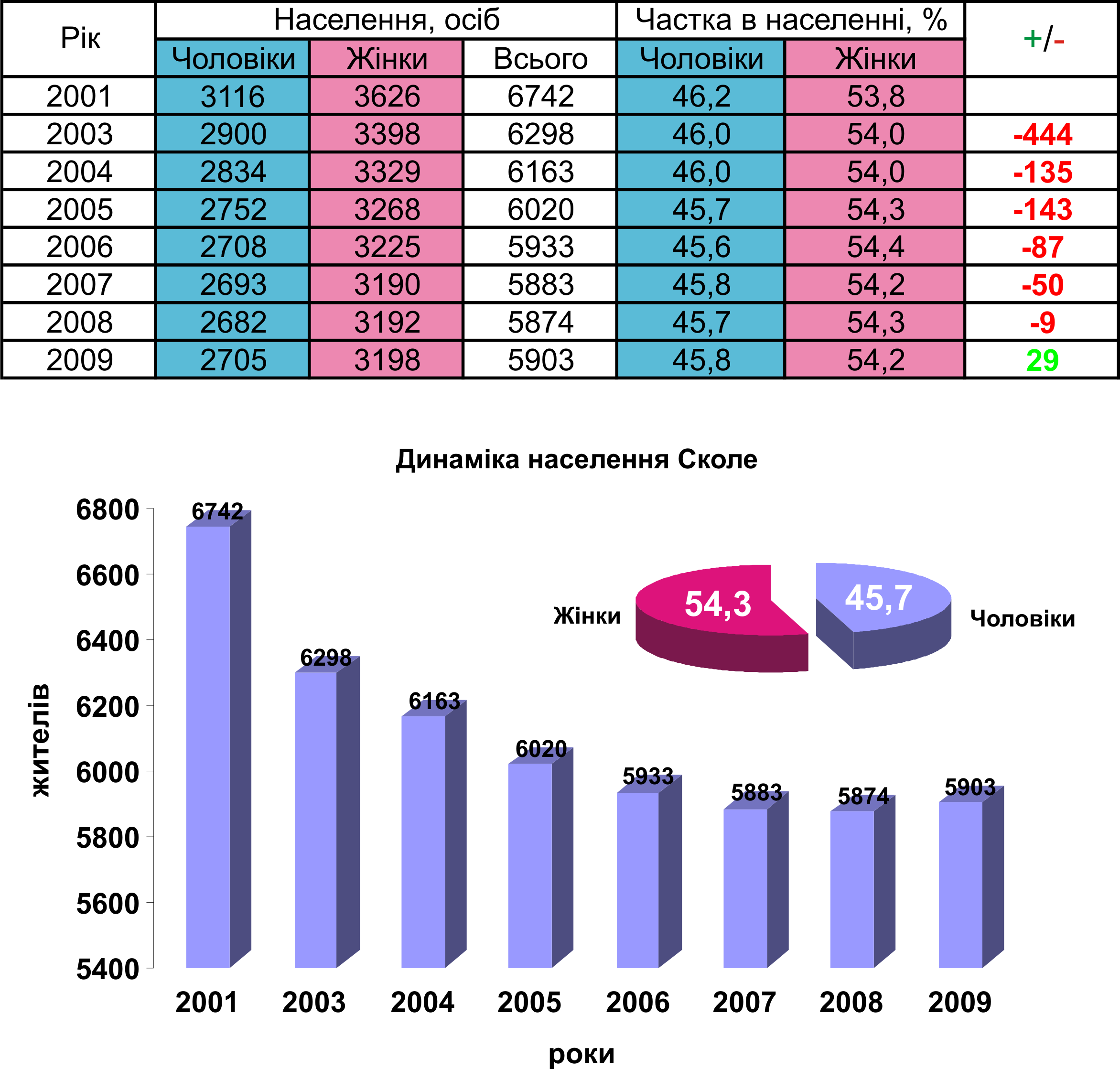 Динаміка і статевий склад населення Сколе за 2001-2009 рр.